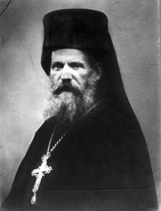 Dimitrios_Ouzounis.